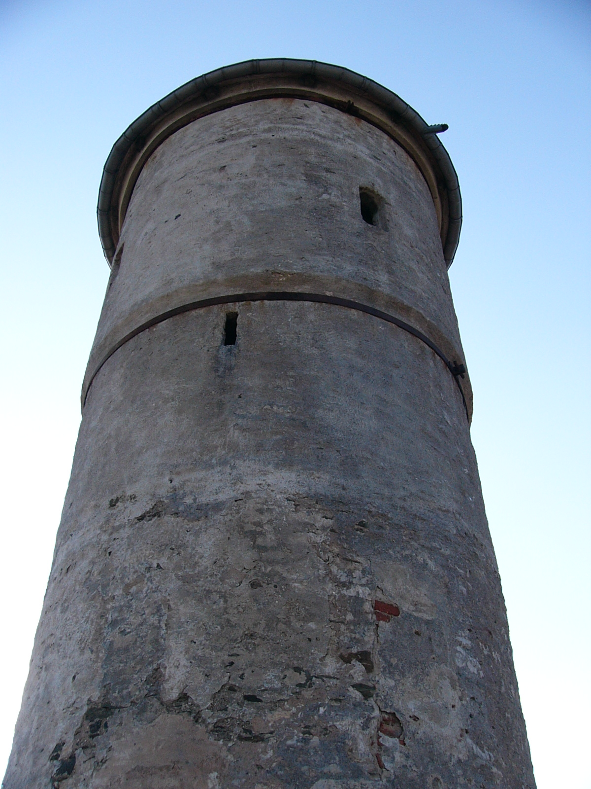 Wartturm in Hof, verschiedene Ansichten